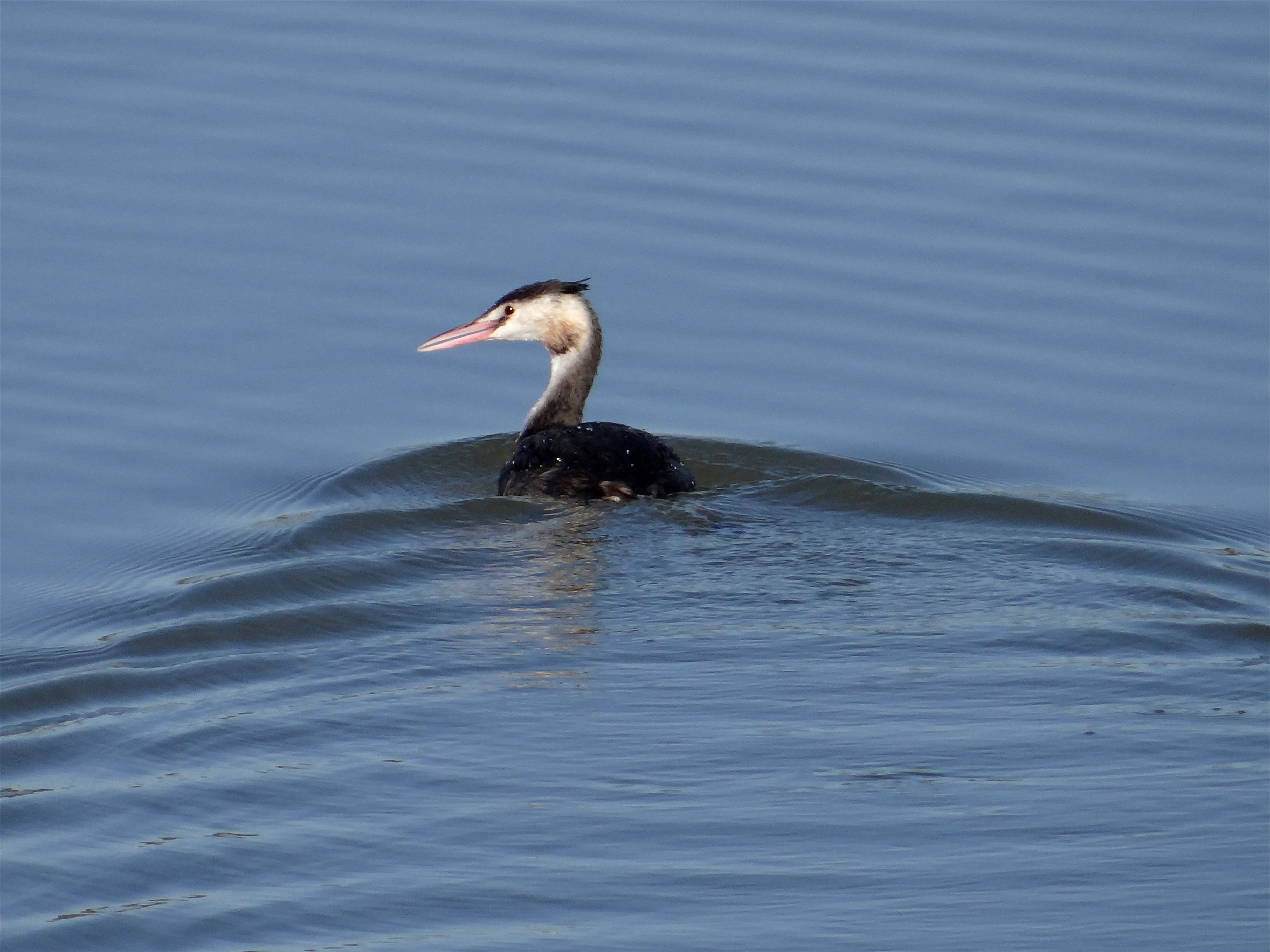 Grèbe huppé en plumage hivernal sur le bord du lac, Villeneuve-de-la-Raho, Pyrénées-Orientales, France.